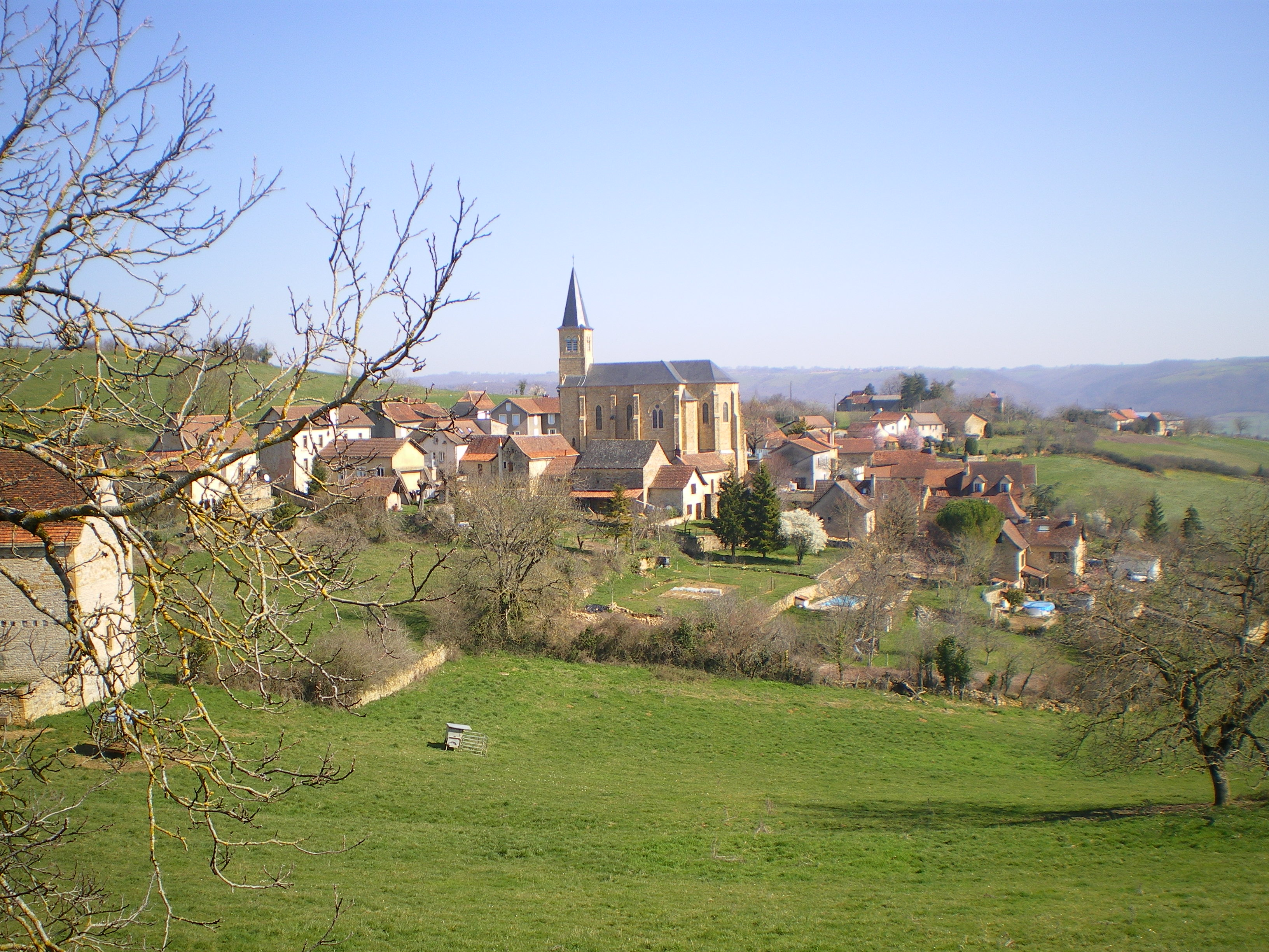 Vue de Naussac, Aveyron, France